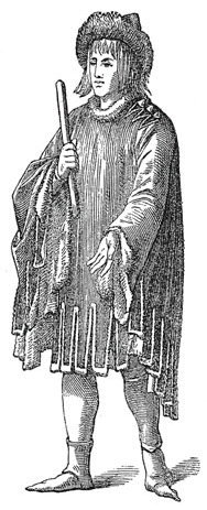 Burgundischer Fürst in der Hoike